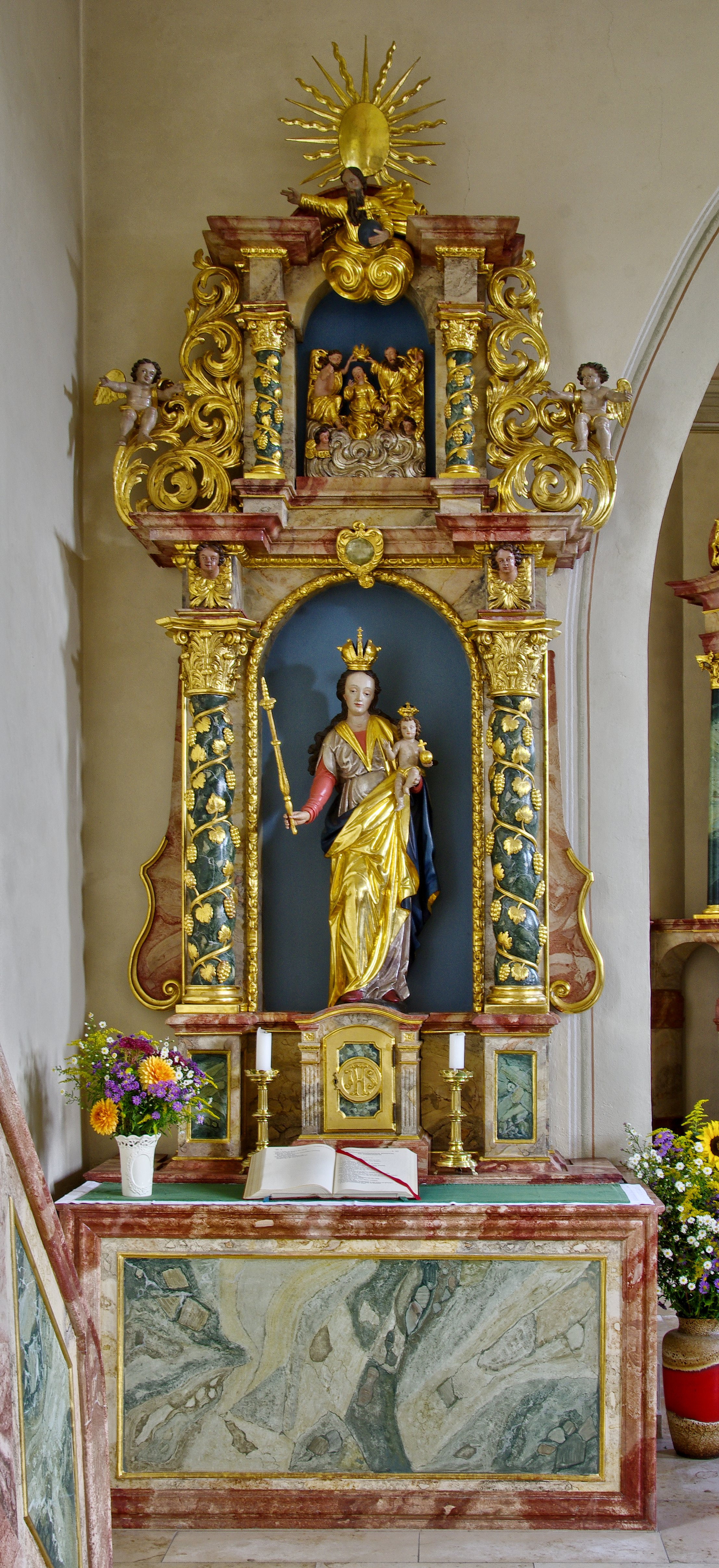 Die Pfarrkirche St.Nikolaus in Waldau Die Ortschaft Waldau gehört zu Titisee-Neustadt